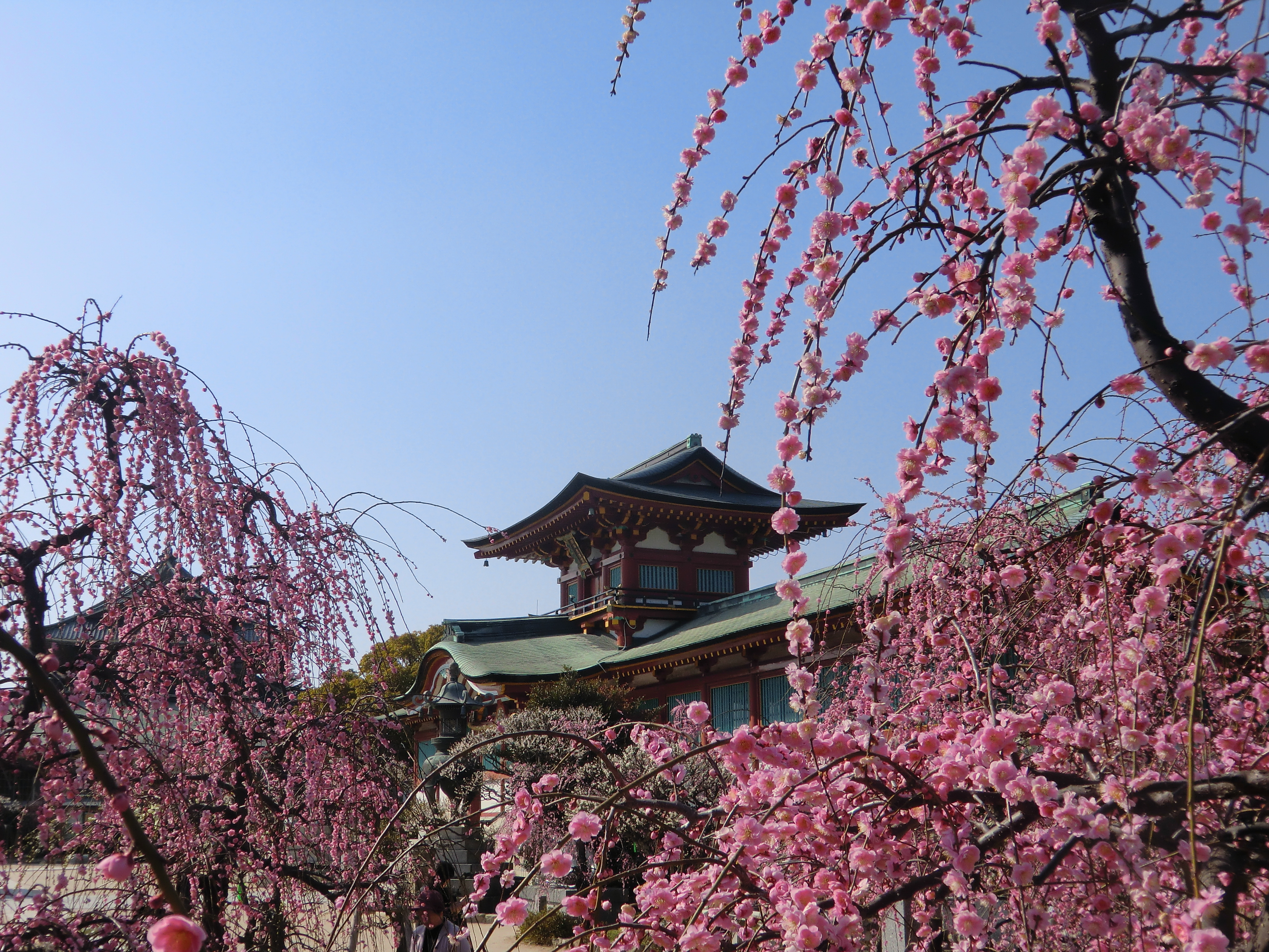 防府天満宮と境内の梅林